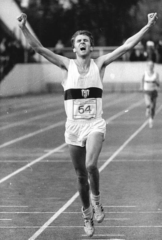 Werner Schildhauer ADN-ZB Kasper 28.5.83-BL- Bez. Gera: Leichtathletik- Bei der ersten WM-Qualifikation auf dem Leichtathletik-Sportfest in Jena siegte Werner Schildhauer vom SC Chemie Halle über 10.000m mit dem neuen DDR-Rekord von 27:24,95.